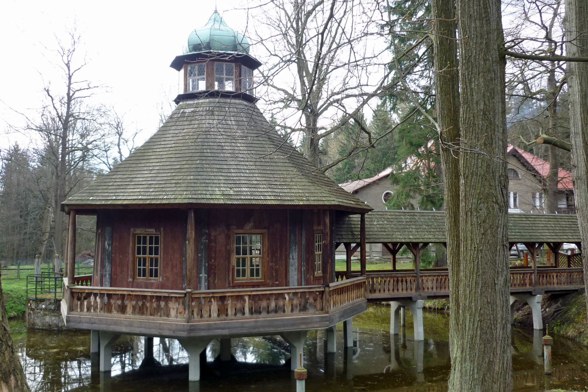 Pavillon in Betlejem bei Grüssau (Krzeszów) in Woiwodschaft Niederschlesien